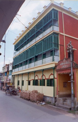 Sri Aurovindo Vidyamandir, Chandannagar